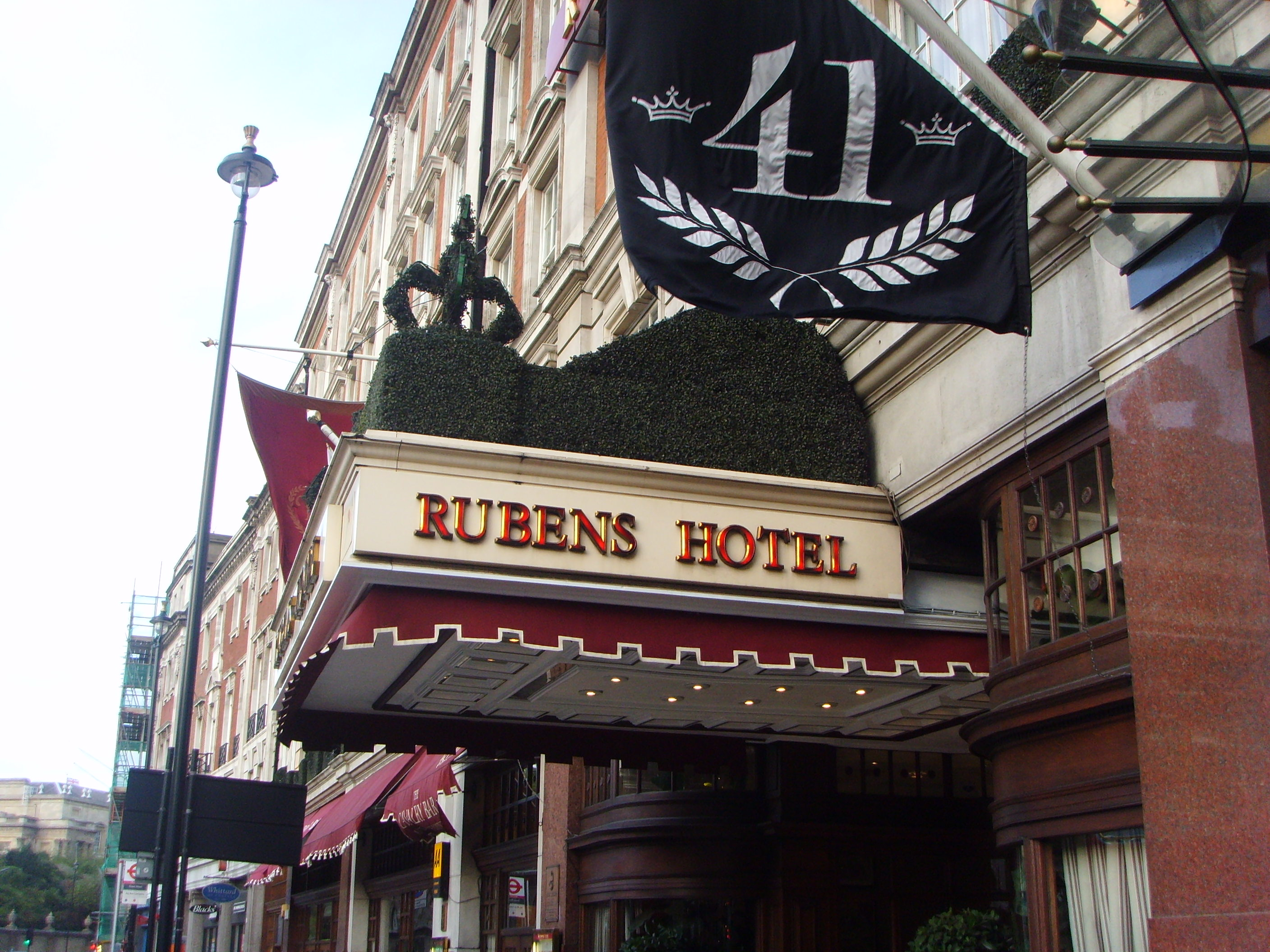 hotel Rubens w Londynie